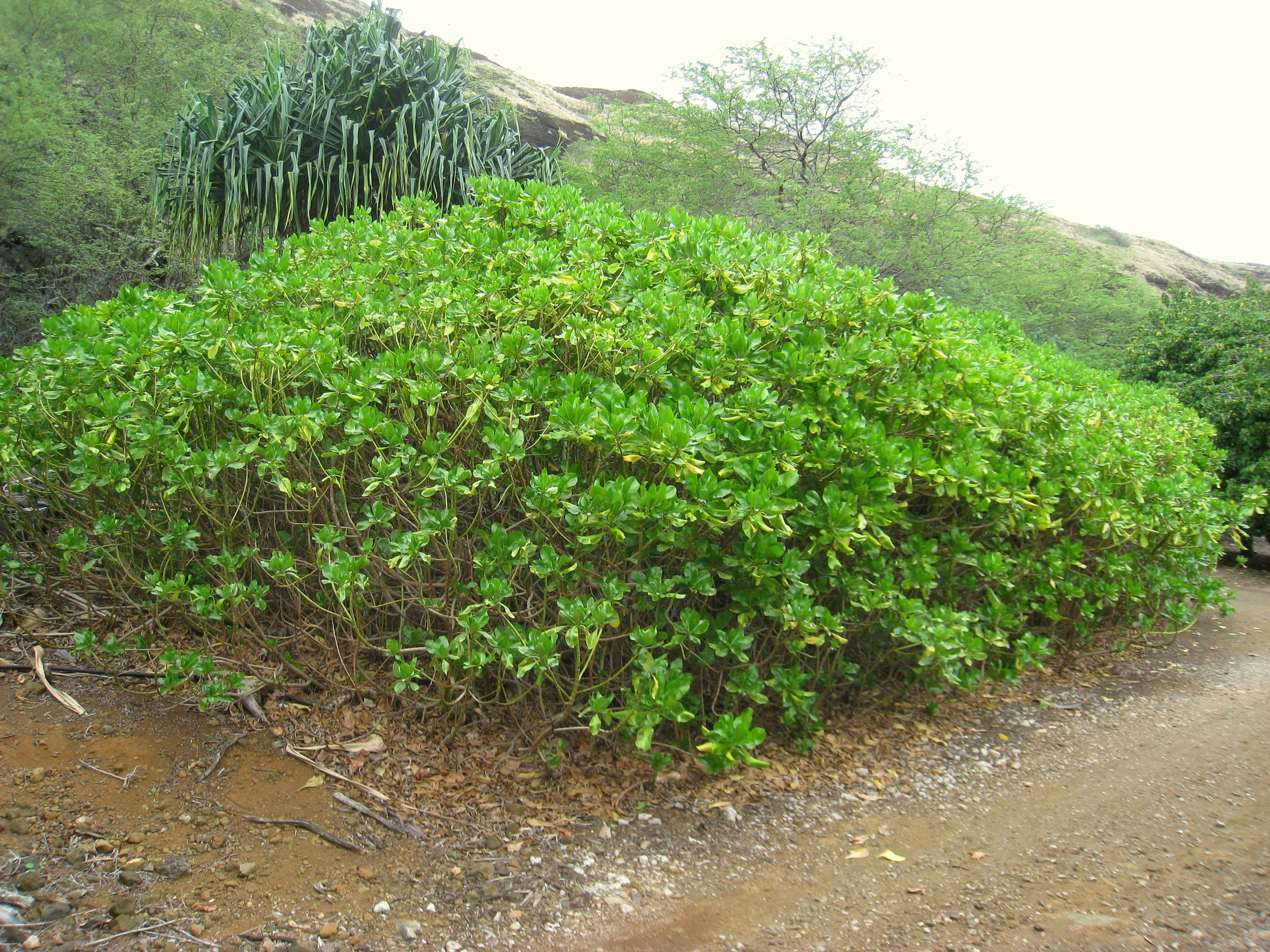 Naupaka kahakai (Scaevola taccada) in the Koko Crater Botanical Garden, Honolulu, Hawaii, USA.